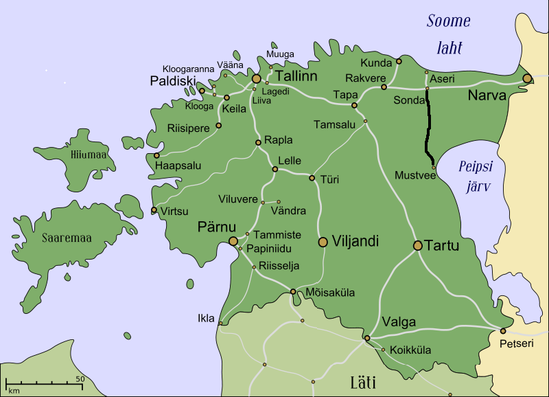 Sonda-Mustvee raudtee (eesti)